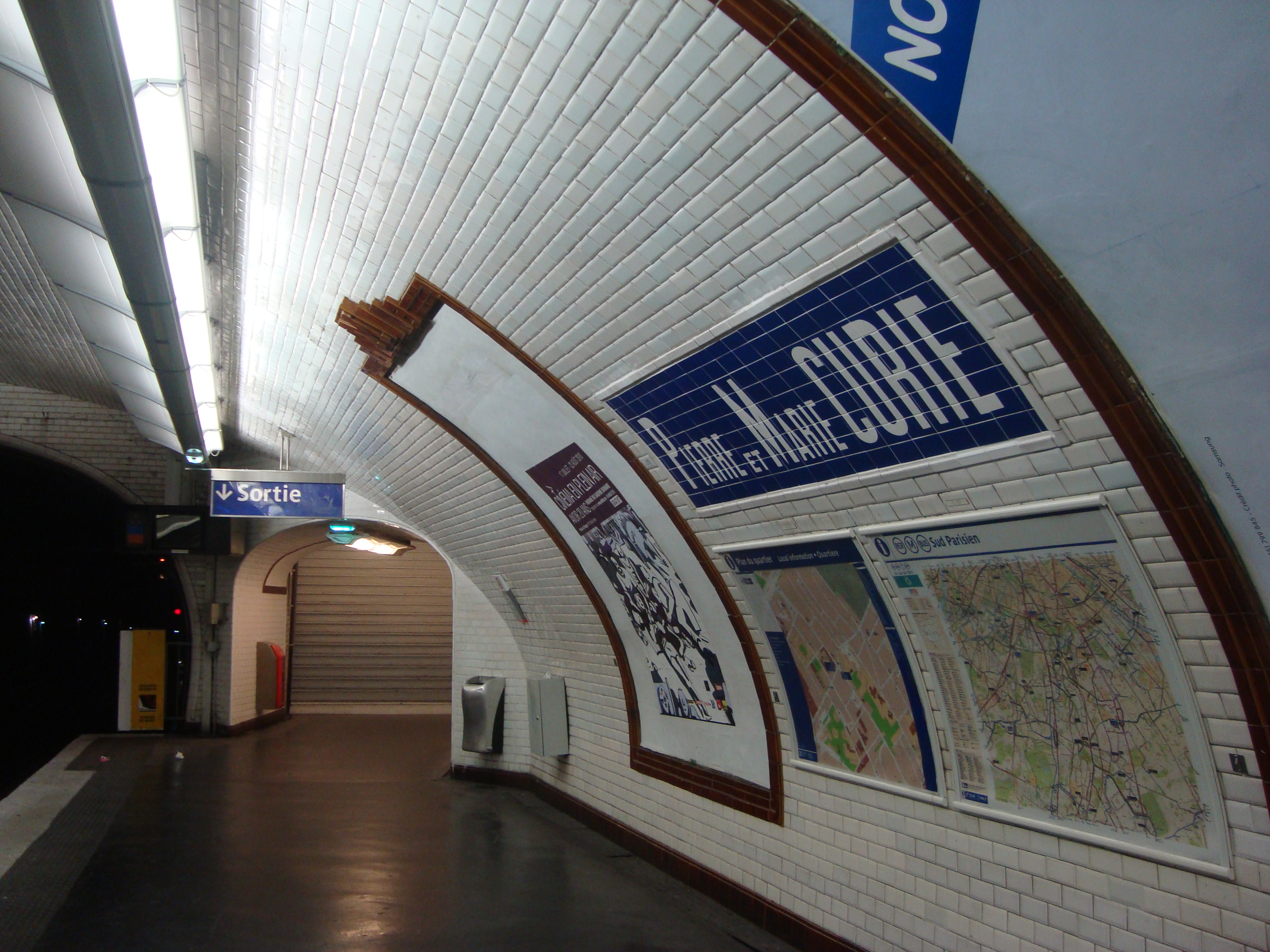 Quais de la station Pierre et Marie Curie sur la ligne 7 du métro de Paris